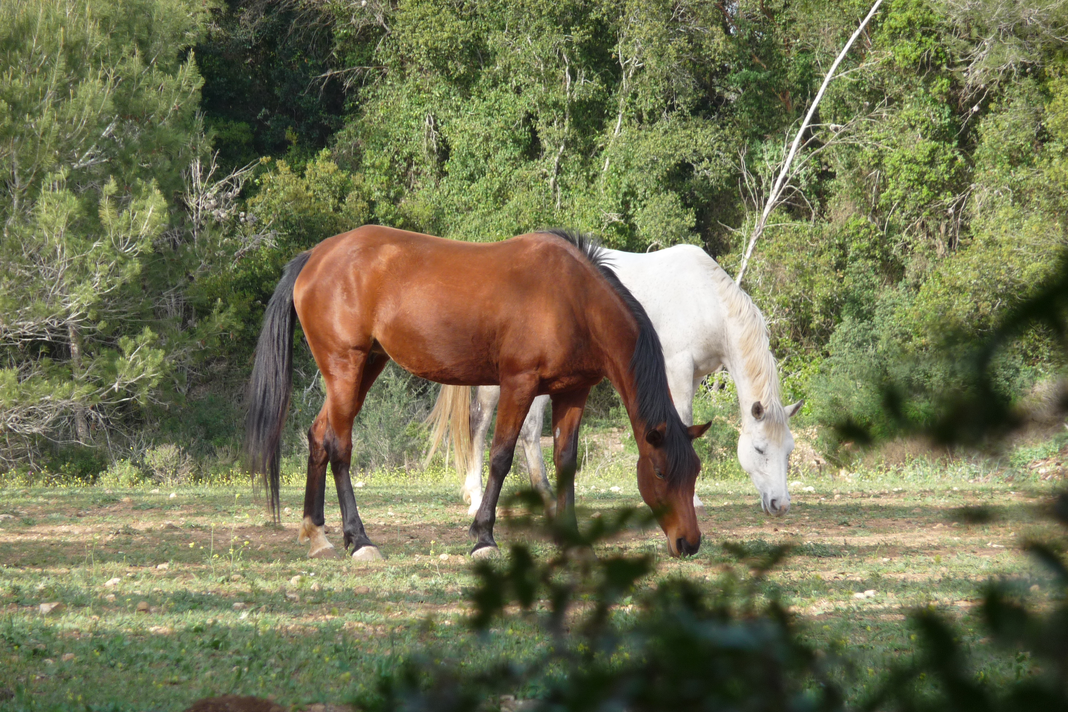 פארק הכרמל הוא כינוי לרצף של גנים לאומיים ושמורות טבע על הר הכרמל הגבוה, המשתרע מגבולותיהן הדרומיים של הערים חיפה ונשר בצפון, ועד אזור נחל מערות ועמק מהר"ל בדרום; שלושה יישובים על רכס הכרמל מהווים מובלעות בתוך רצף שטחי הפארק - עספיא, דלית אל כרמל ובית אורן. גודל הפארק המקורי היה 101,590 דונם, מתוכם 63,950 דונם שהוגדרו כ-"גן לאומי" ו-37,640 דונם הוגדרו כ"שמורת טבע". שטח השמורות משולב בתוך פארק הכרמל כאשר שטחי הגן הלאומי מקיפים את השמורות ויוצרים רצף של שטחים ירוקים.